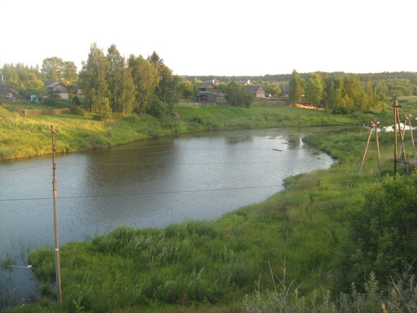 Kamenka River in Sonkovo (Tver region, Russia)